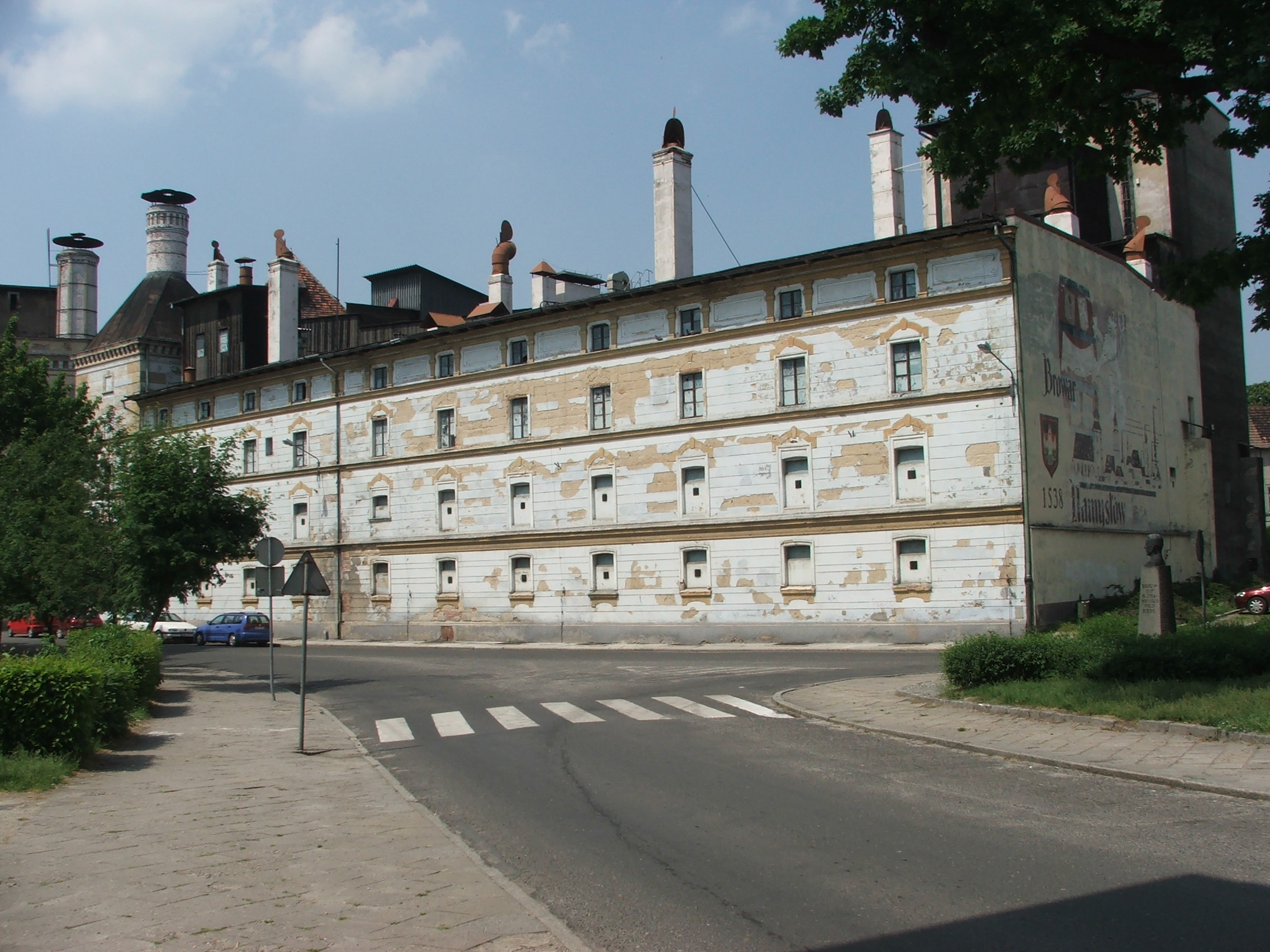 Widok na Browar Namysłów z ulicy 3-Maja